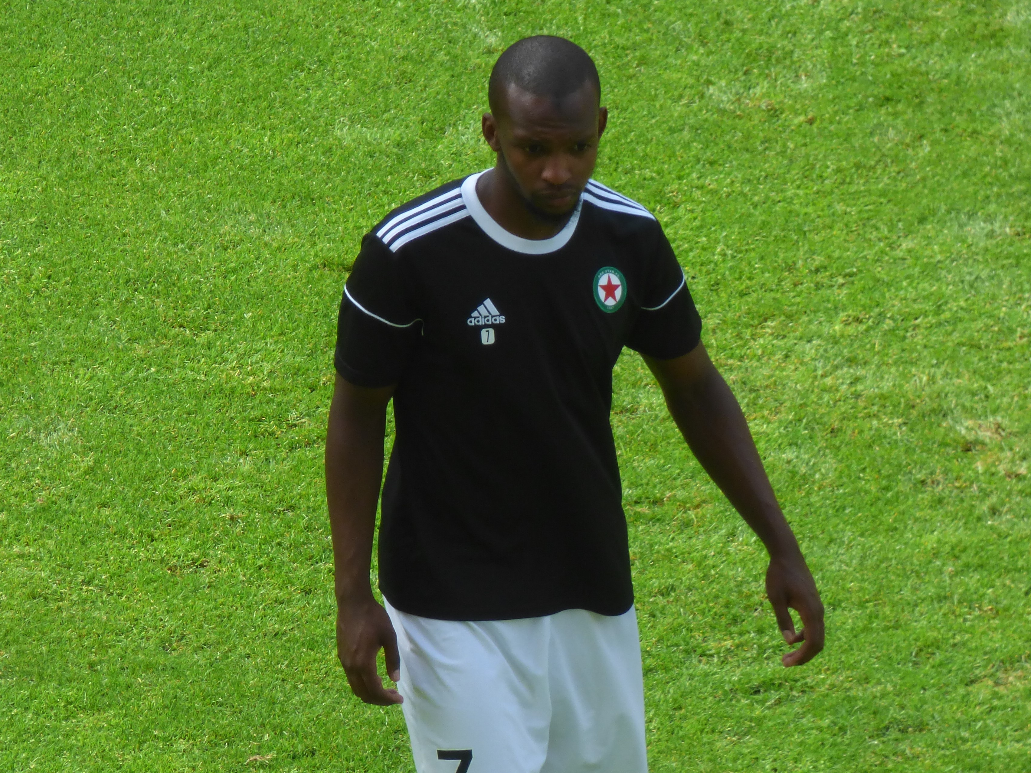 Amadou Diallo avant le match RC Lens / Red Star, comptant pour la deuxième journée du championnat de France de Ligue 2 2018-2019 au Stade Bollaert-Delelis, le 4 août 2018.